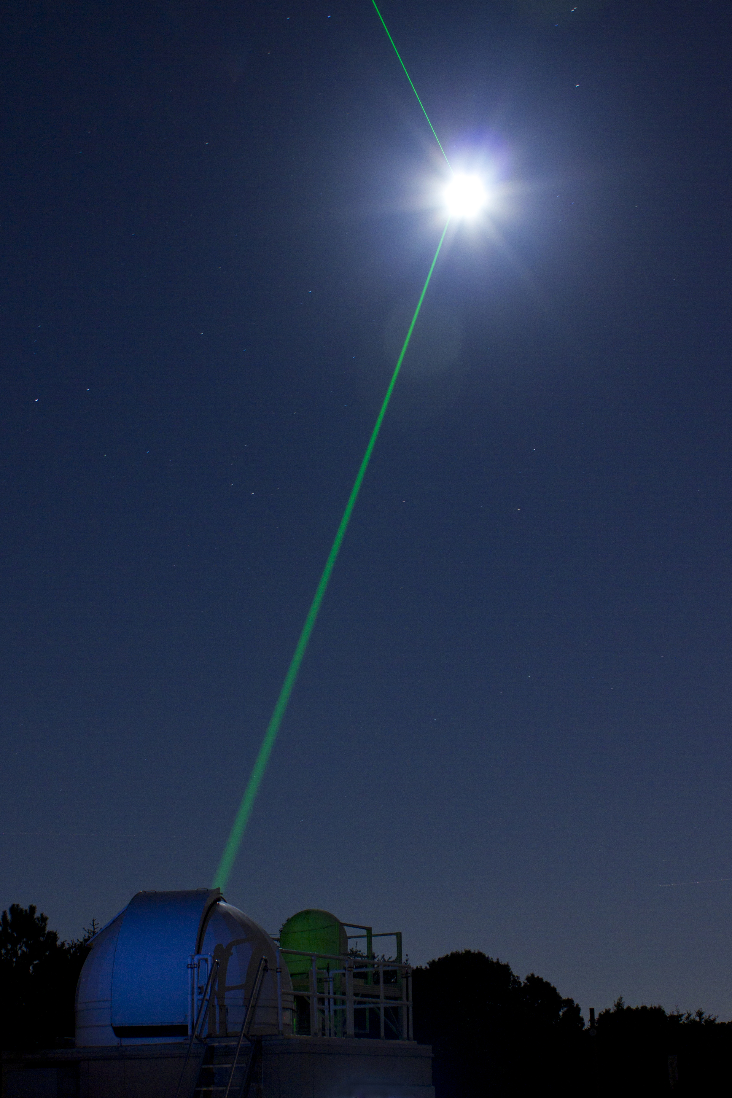 amazing lunar laser show